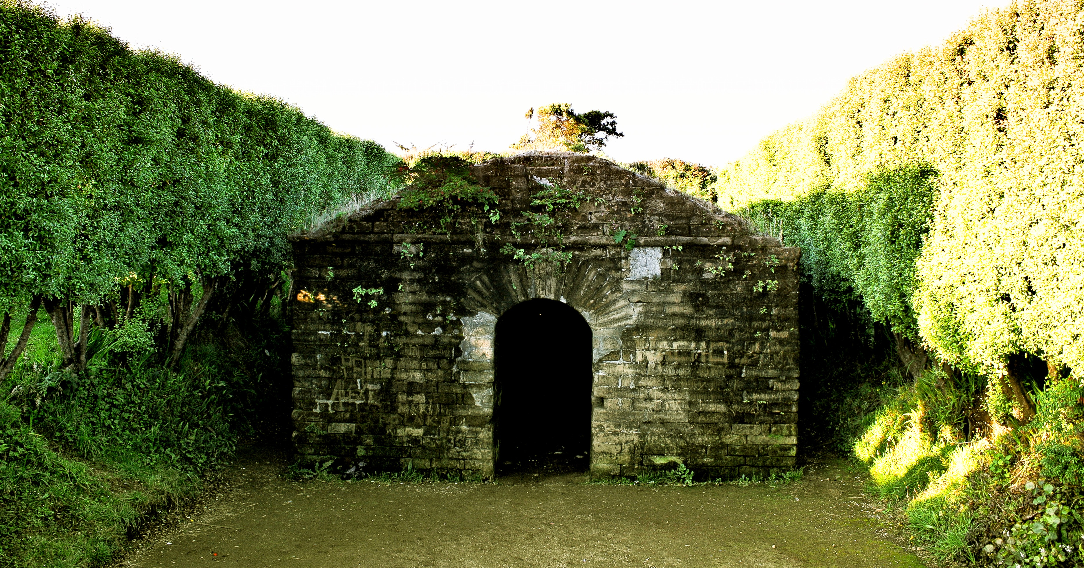 Polvorín This is a photo of a national monument in Chile: 2069